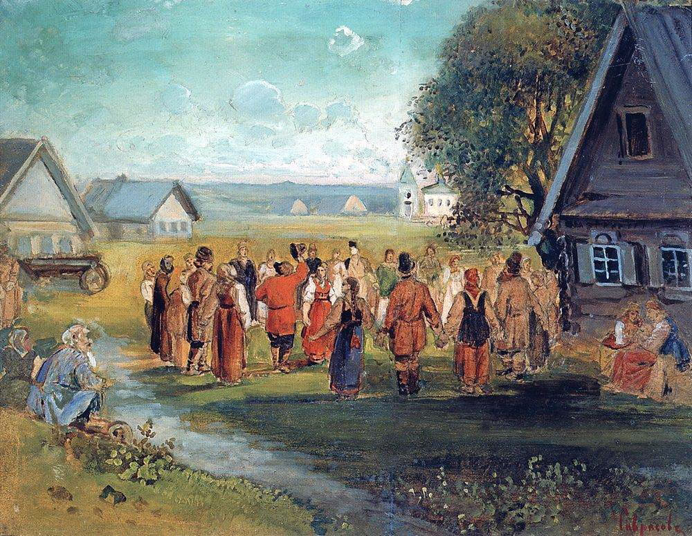 А. Саврасов. Хоровод в селе. 1873-1874